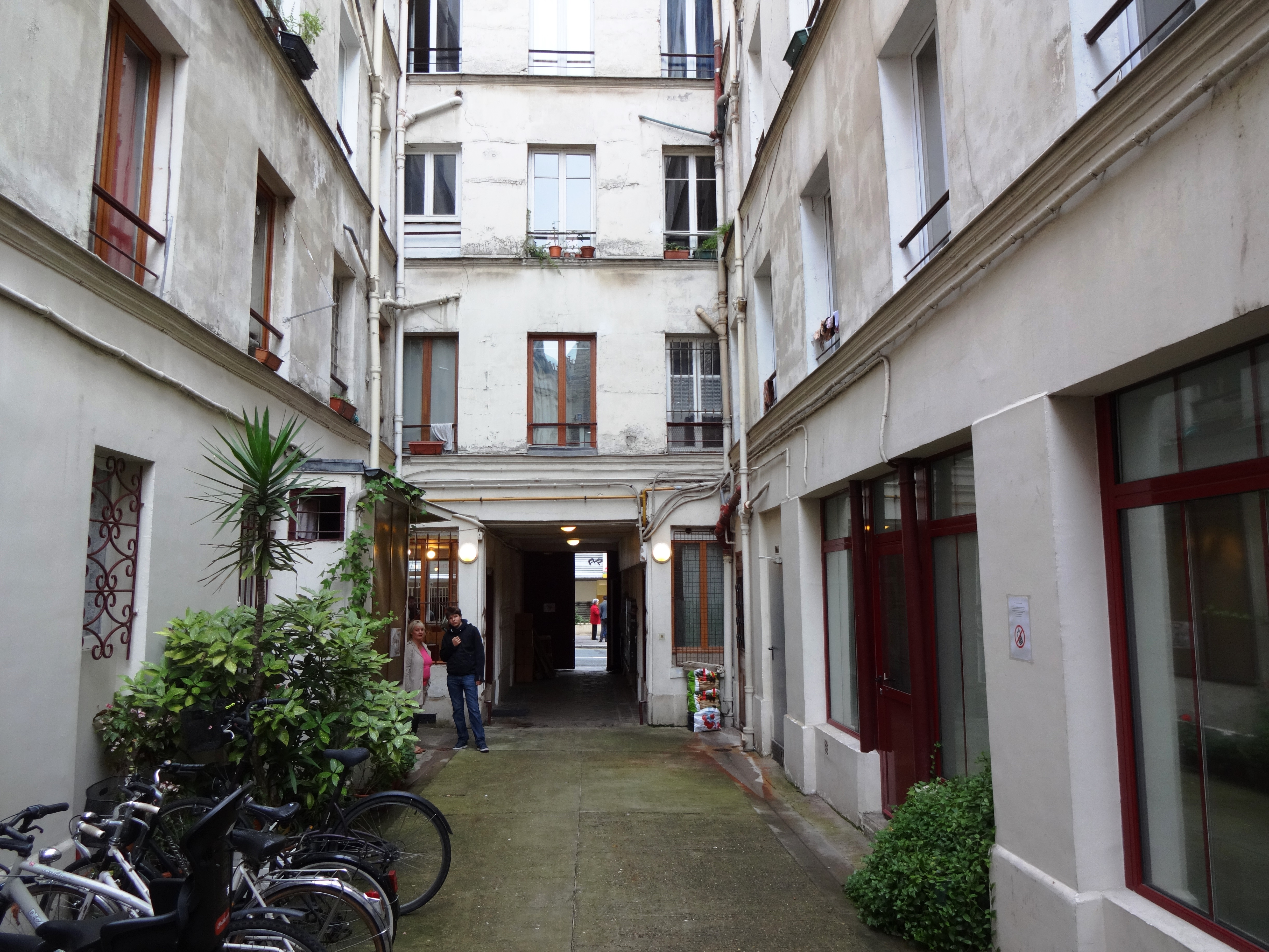 Innenhof der ARTE "Philosophie"-Aufnahmelokalität, Rue St. Maur, Paris